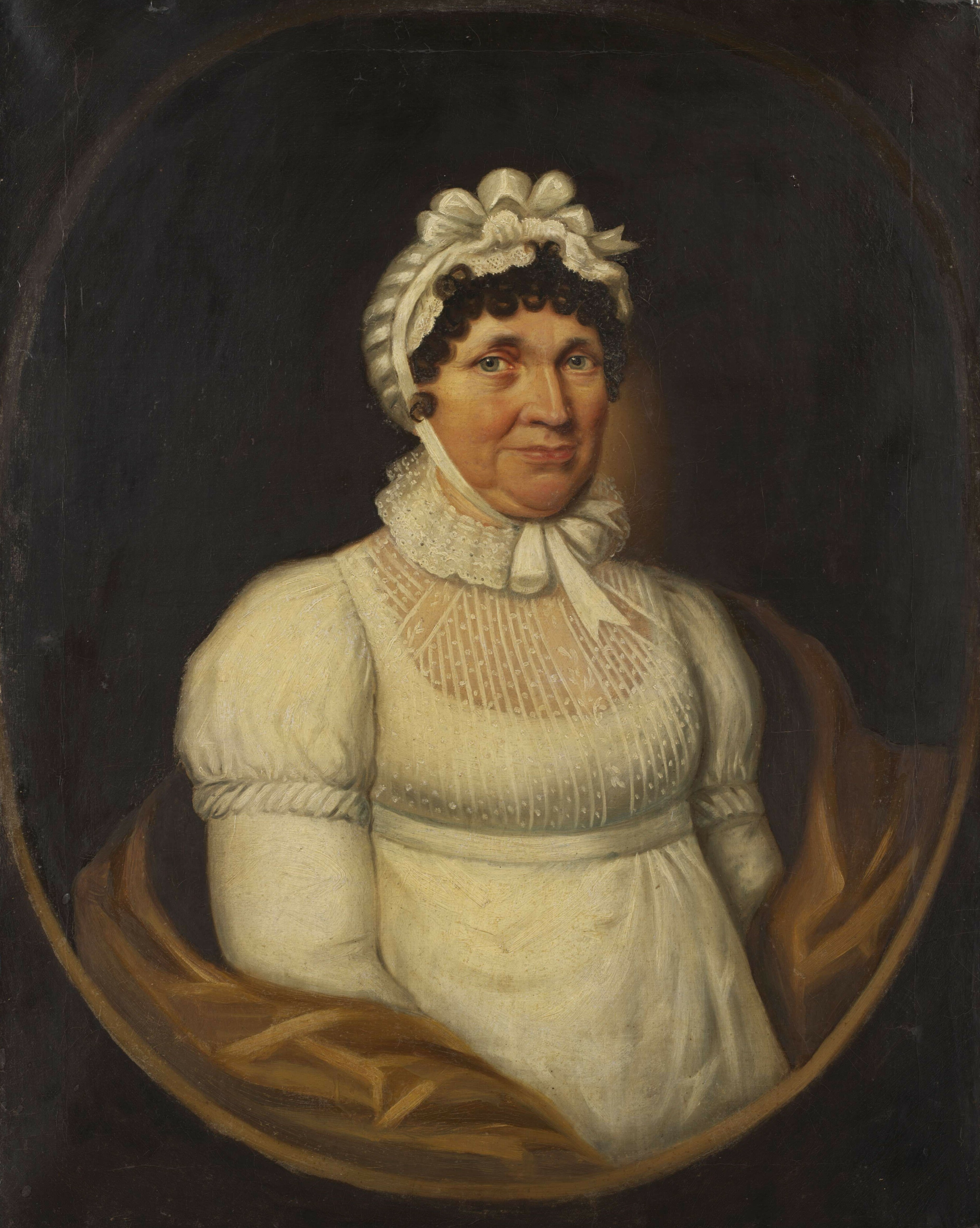 Christine Wilhelmine, geb. Gräfin von Isenburg-Büdingen (1756-1826), war vermählt mit Wilhelm Iosias II. Graf von Waldeck-Bergheim (1733-1788)